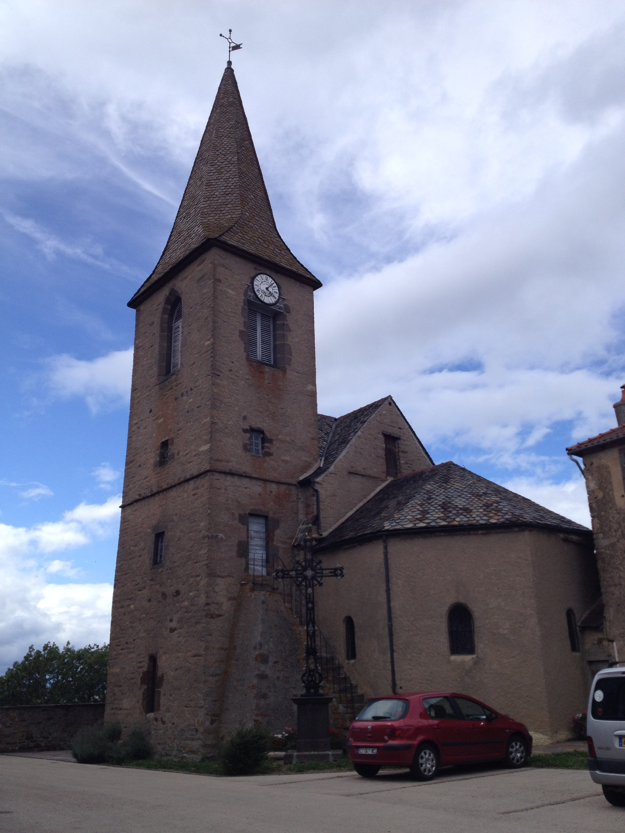 Église Notre-Dame-de-l'Assomption de La Chapelle-Laurent (côté place)